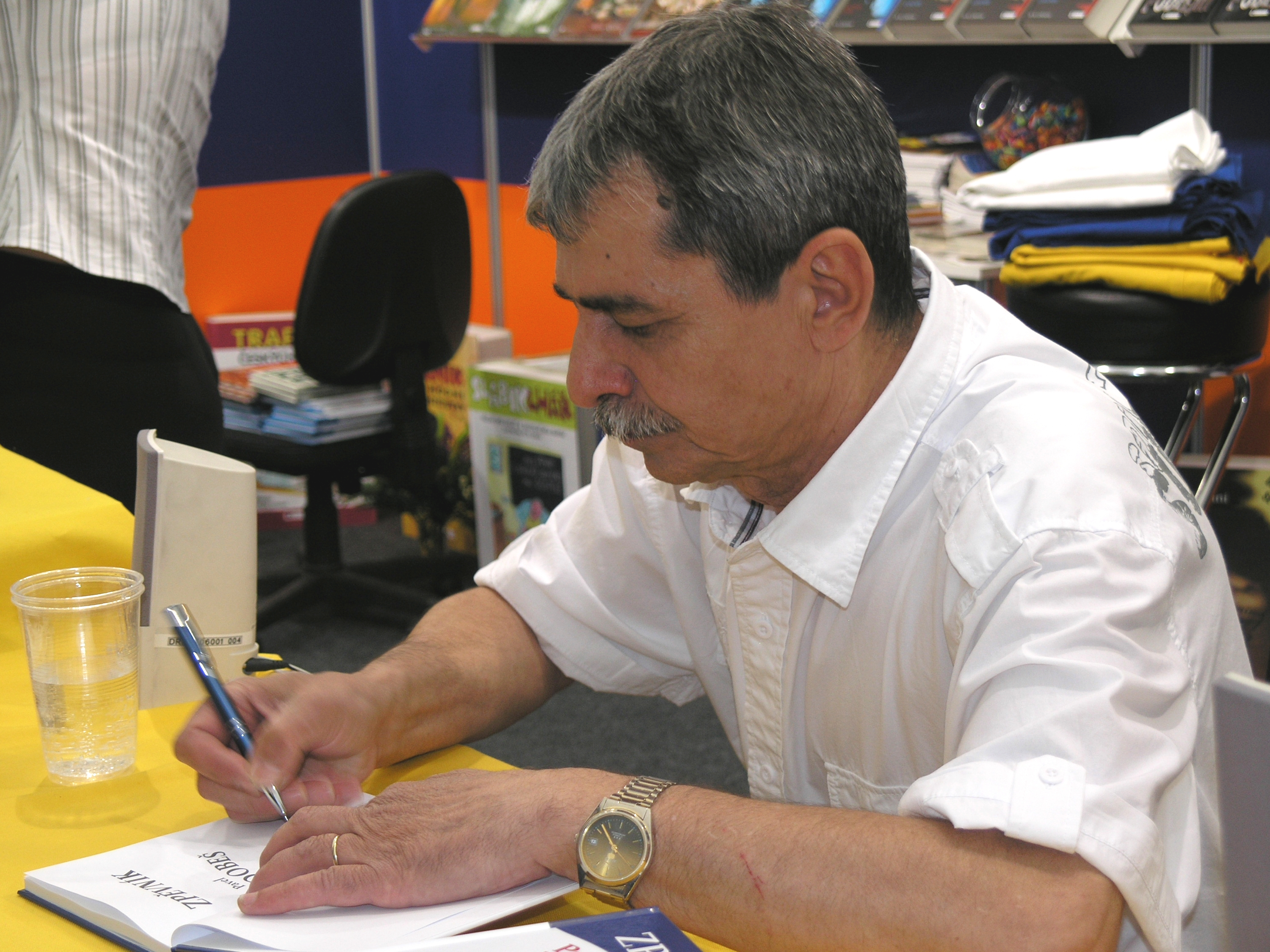 Praha, Svět knihy 2009 - Pavel Dobeš